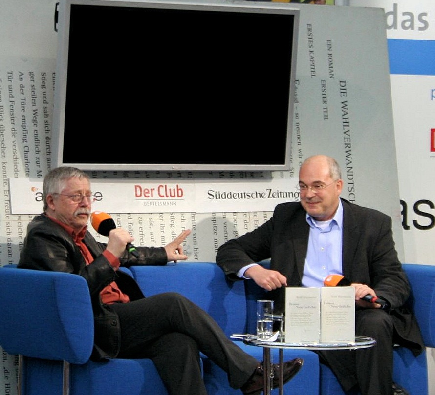 Wolf Biermann (li.) im Interview mit Journalist Christhard Läpple auf dem "Blauen Sofa" bei der Leipziger Buchmesse, seinen Lyrikband "Heimat. Neue Gedichte" vorstellend